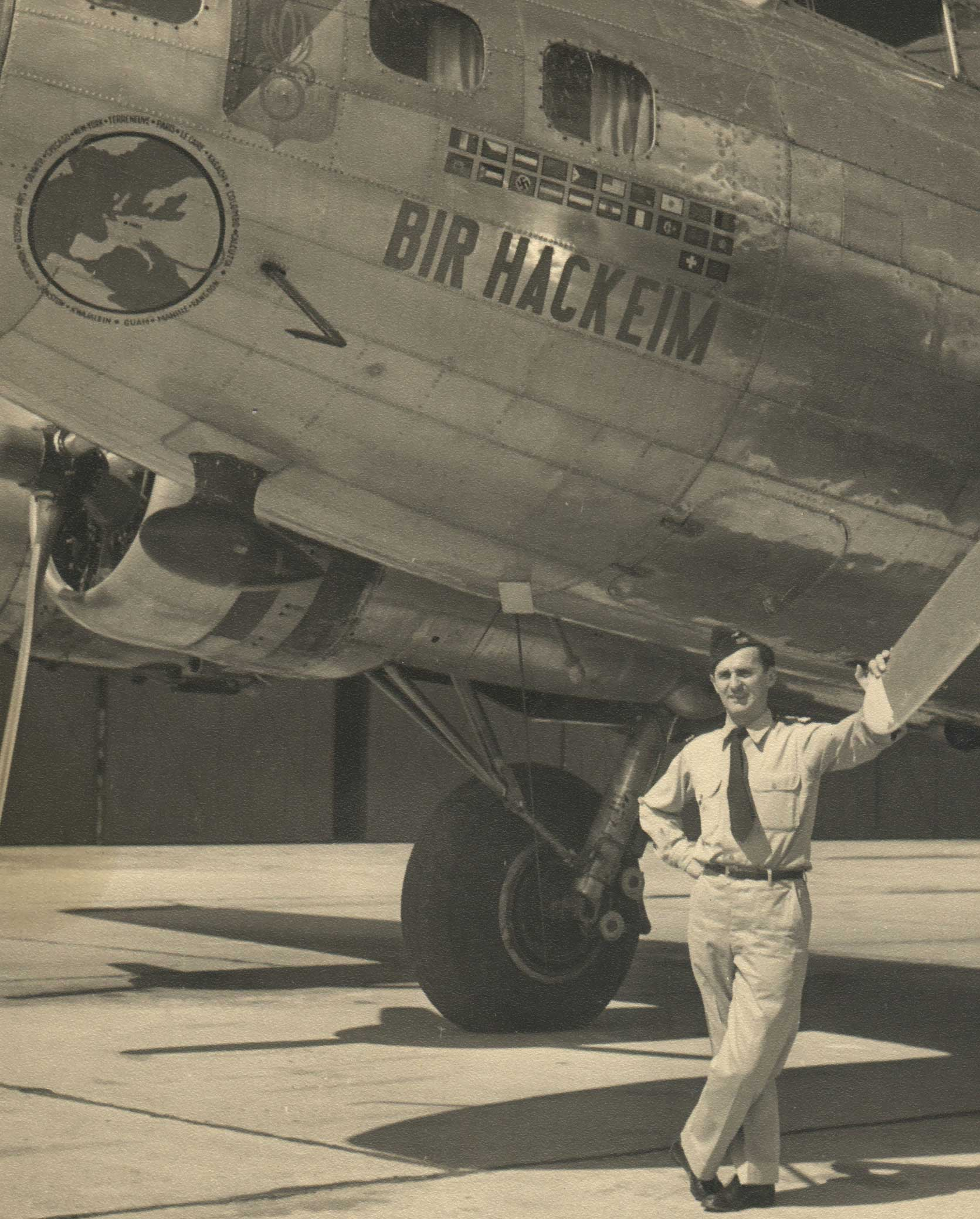 Francis Melville-lynch auprès de la forteresse Bir-Hakeim en 1945